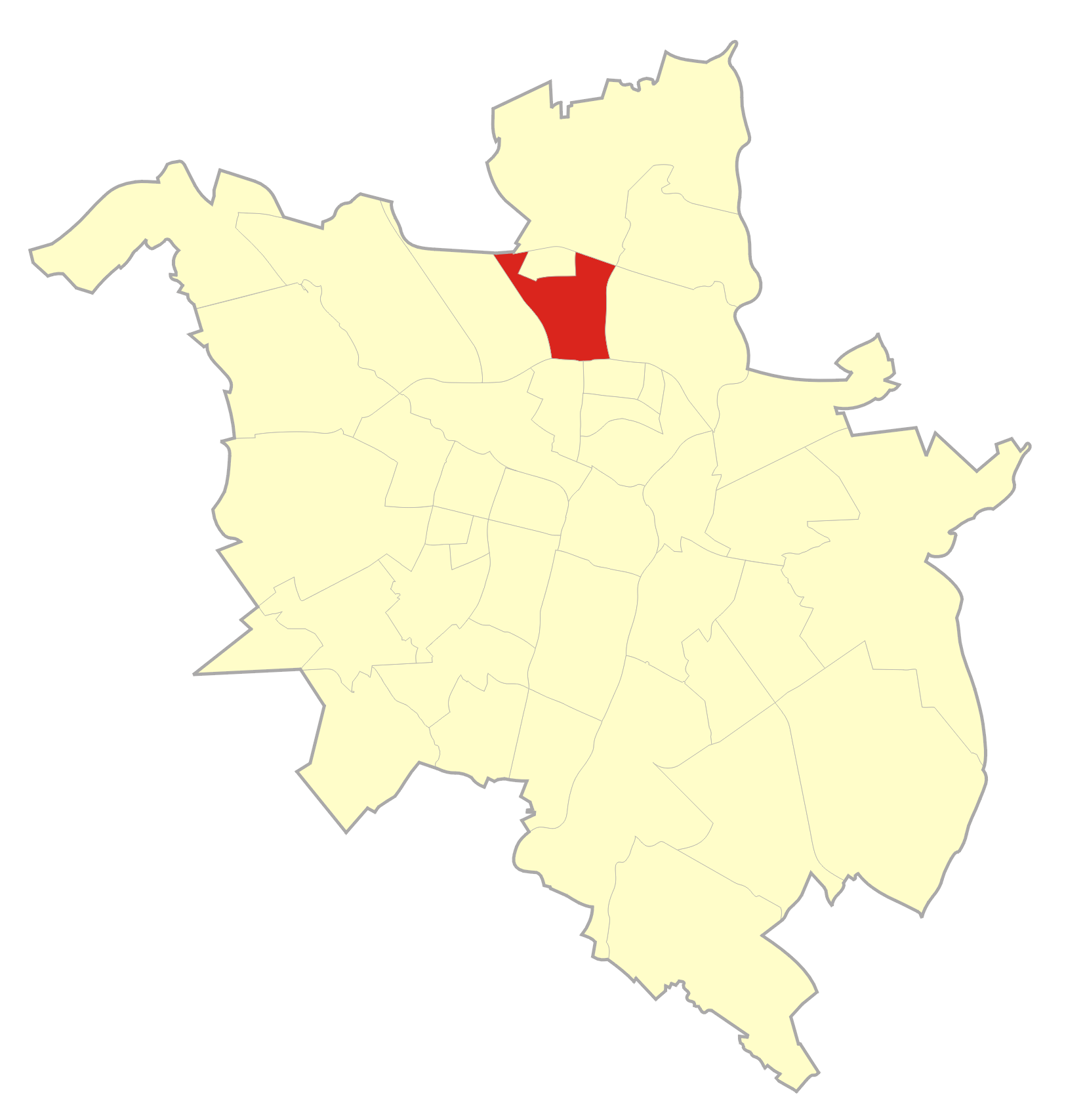 Osiedle Piątkowo - jednostka pomocnicza Poznania od 2011 r.